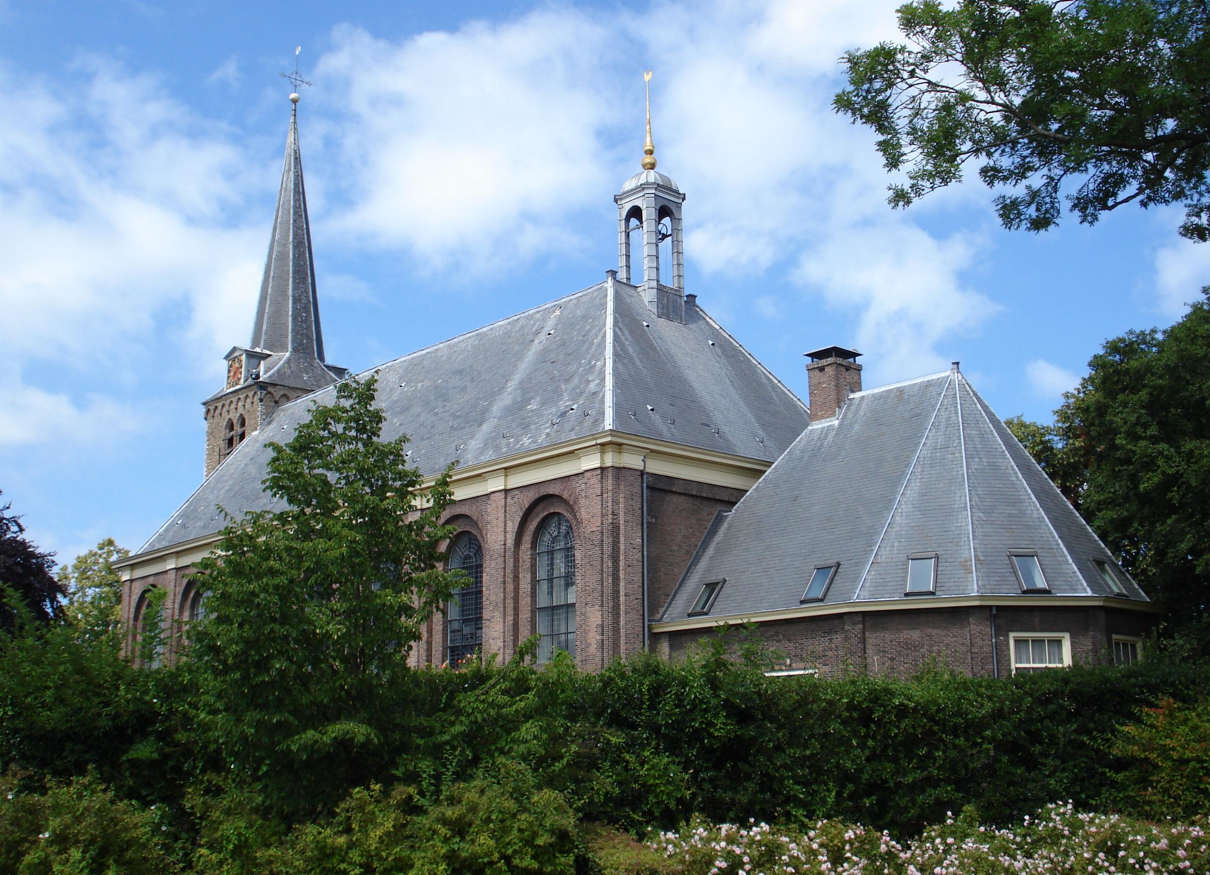 Dorpskerk Berkel en Roderijs